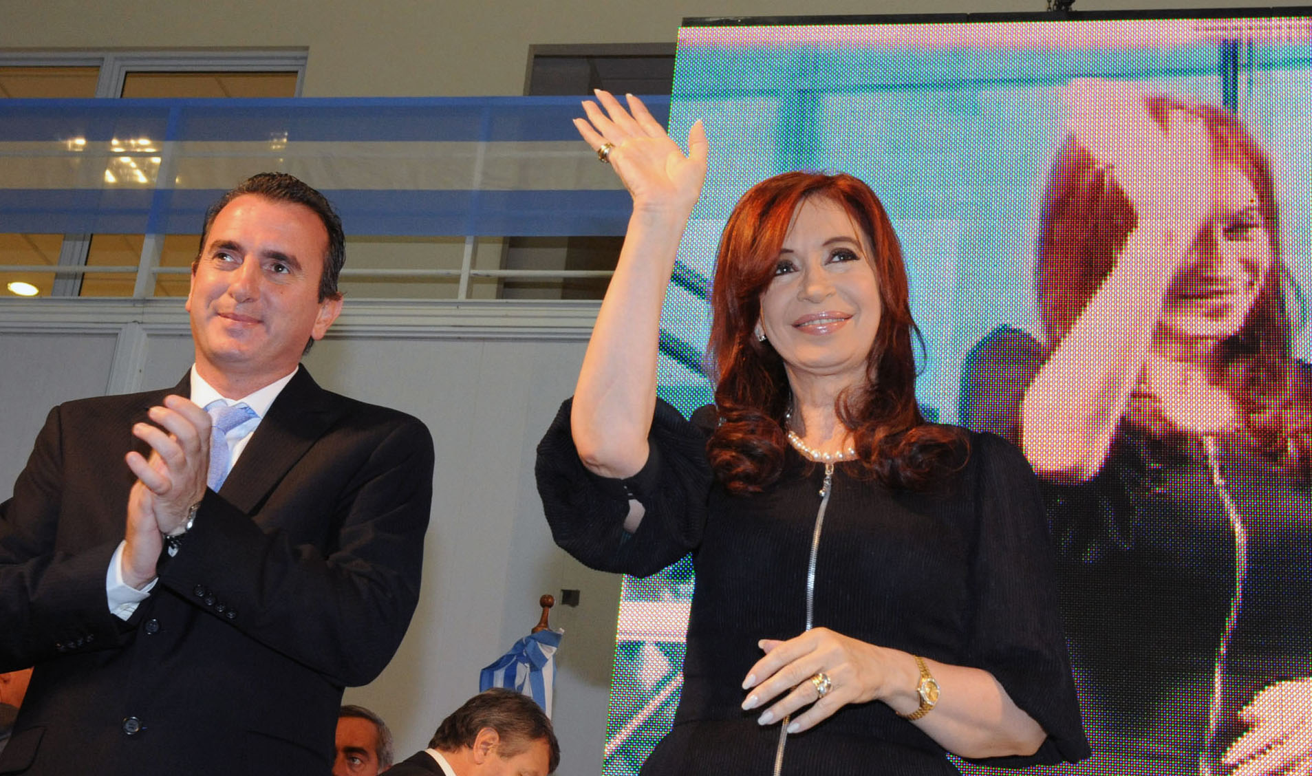 La presidenta Cristina Fernández saluda durante el acto en las Bodegas Bianchi, en Mendoza. La acompaña el gobernador mendocino, Francisco Pérez.